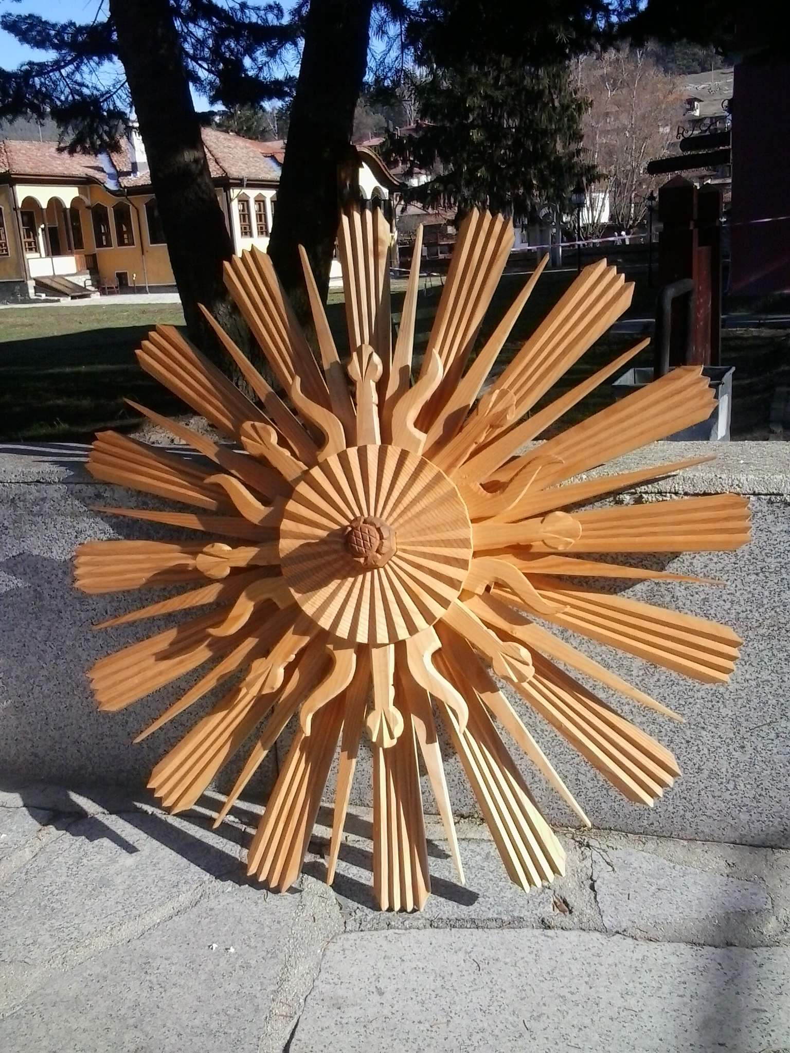 "Слънце". Снимка и изработка на обекта — Luxferuer. Публикувана в мои блогове. Свободен достъп.